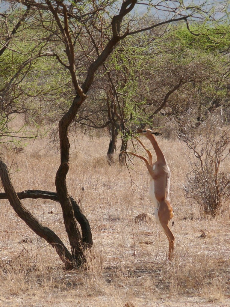 Une antilope girafe en train de se nourrir dans la réserve nationale de Samburu